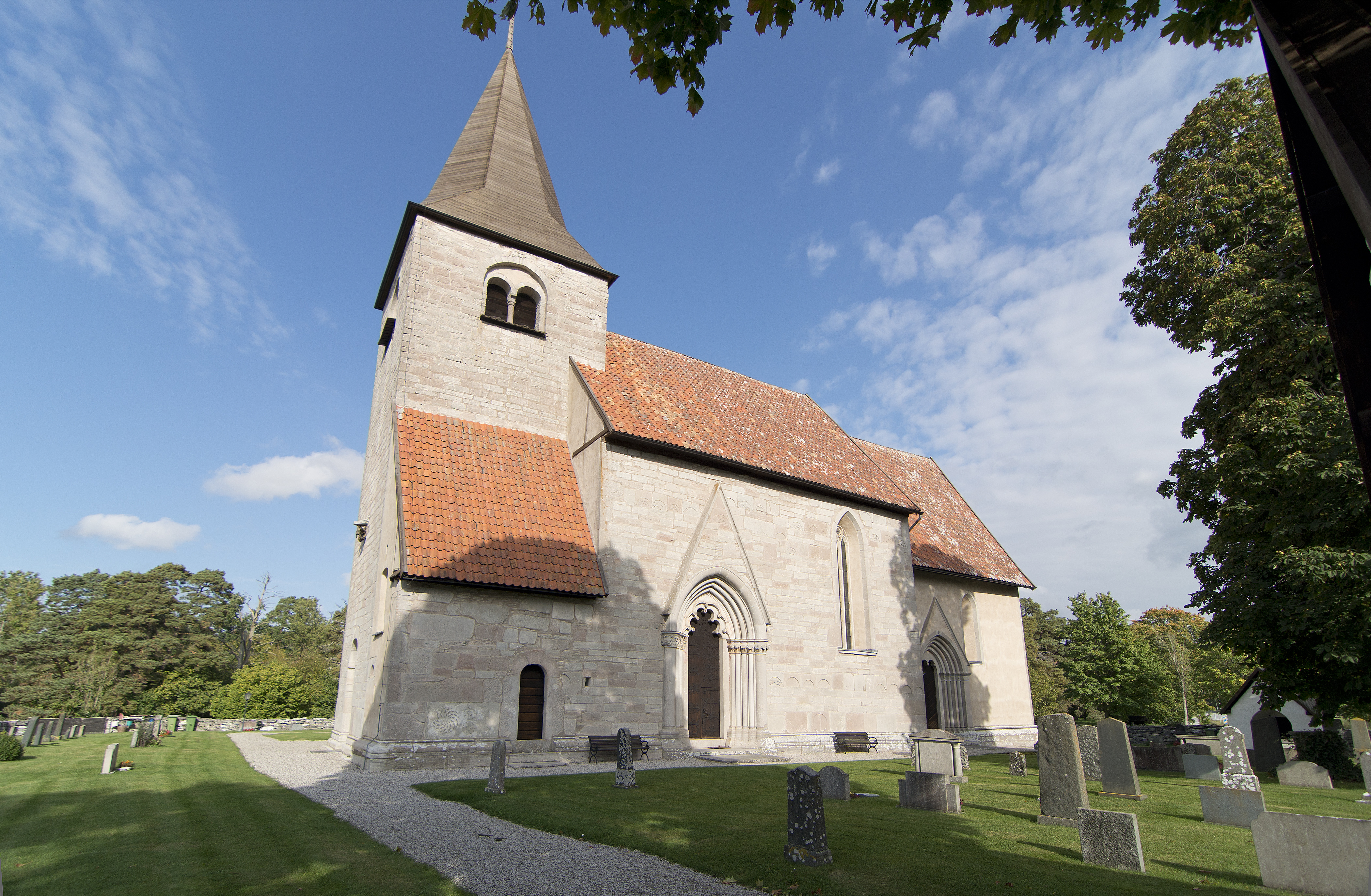 Bro kyrka Gotland